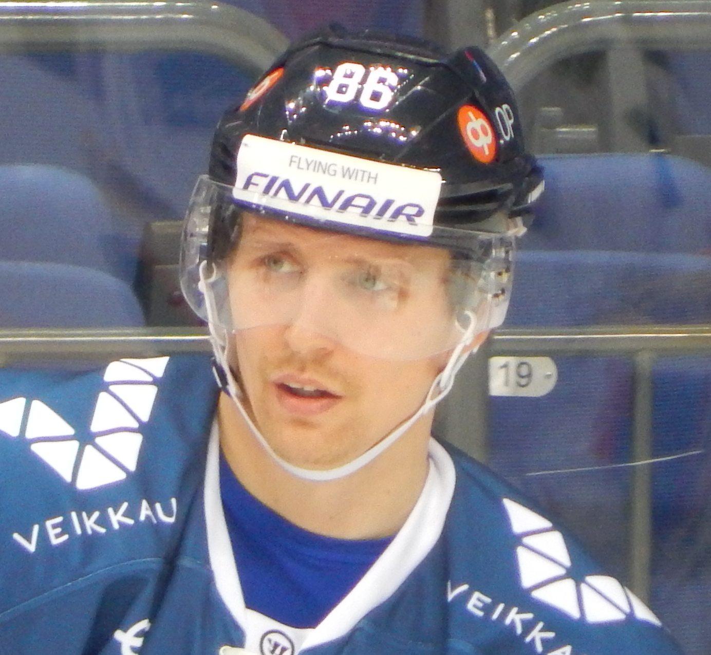 Кубок Первого Канала 2017, матч Финляндия - Южная Корея (15 декабря 2017) 86 SAVINAINEN,Veli-Matti